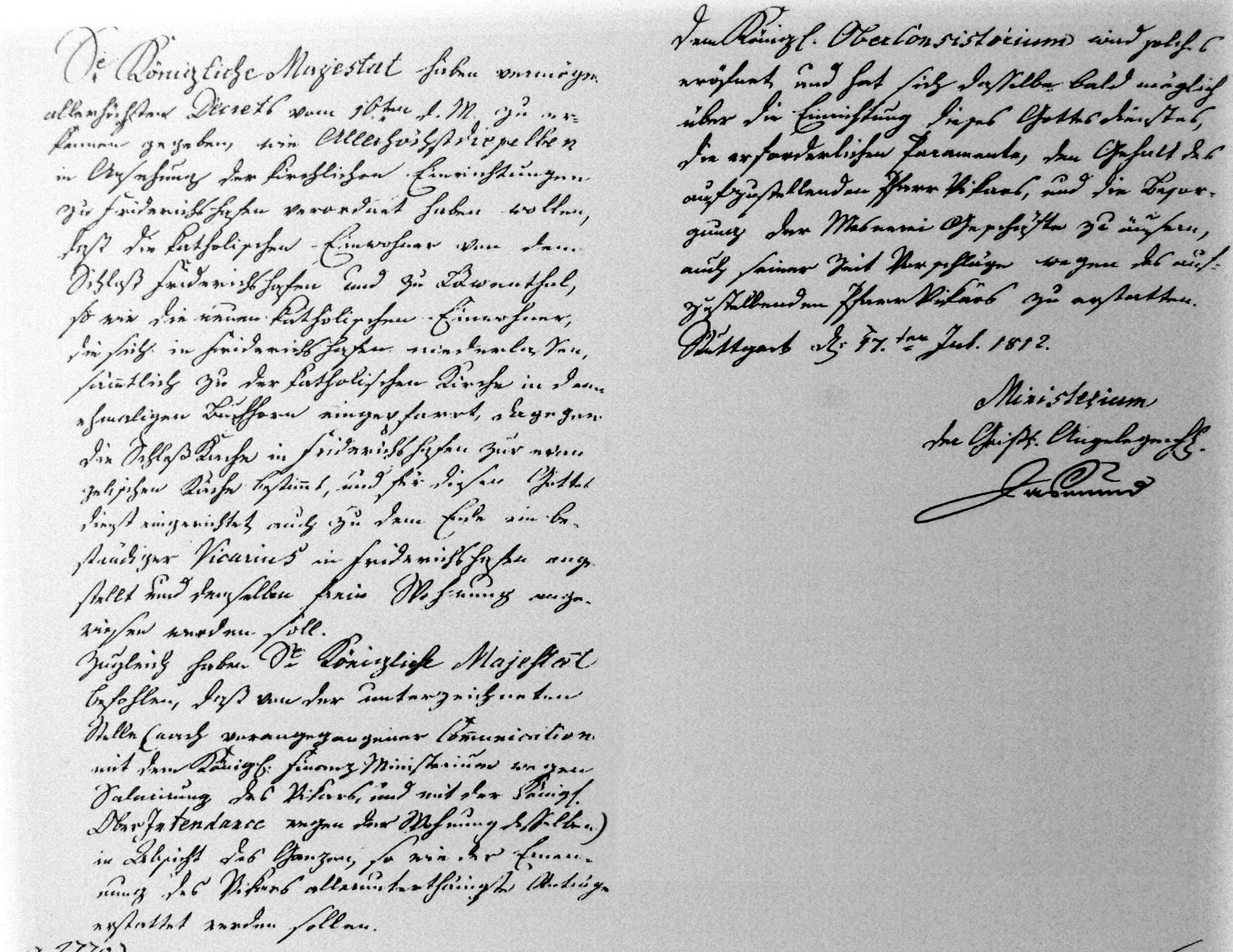 Urkunde der Verfügung der Gründung der Evangelischen Kirchengemeinde Friedrichshafen durch König Friedrich von Württemberg, 1812 Transkription nach der in der Schlosskirche aushängenden Schautafel: Seine Königliche Majestät haben vermögen allerhöchsten Decrets vom 16. ten d. M. zu erkennen gegeben, wie Allerhöchstdieselben in Ansehung der kirchlichen Einrichtungen zu Friderichshafen verordnet haben wollen, daß die katholischen Einwohner von dem Schloß Friderichshafen und zu Löwenthal, so wie die neuen katholischen Einwohner, die sich in Friderichshafen niederlassen, sämmtlich zu der katholischen Kirche in dem ehemaligen Buchhorn eingepfarrt, dagegen die Schloßkirche in Friderichshafen zur evangelischen Kirche bestimmt, und für diesen Gottesdienst eingerichtet, auch zu dem Ende ein beständiger Vicarius in Friderichshafen angestellt und demselben freie Wohnung angewiesen werden soll. Zugleich haben Seine Königliche Majestät befohlen, daß von der unterzeichneten Stelle (nach vorangegangener Communication mit dem Königl. Finanz Ministerium wegen Salarierung des Vikars, und mit der Königl. Oberintendance wegen der Wohnung desselben) in Absicht des Ganzen, so wie der Ernennung des Vikars allerunterthänigste Anträge erstattet werden sollen. Dem Königl. Oberconsistorium wird solches eröffnet und hat sich dasselbe bald möglich über die Einrichtung dieses Gottesdienstes, die erforderlichen Paramente, den Gehalt des aufzustellenden Pfarr Vikars, und die Besorgung der Mesnerei Geschäfte zu äußern, auch seiner Zeit Vorschläge wegen des aufzustellenden Pfarr Vikars zu erstatten. Stuttgart, den 17. ten Juli 1812 Ministerium der Geistl. Angelegenheit gez. Wasmund